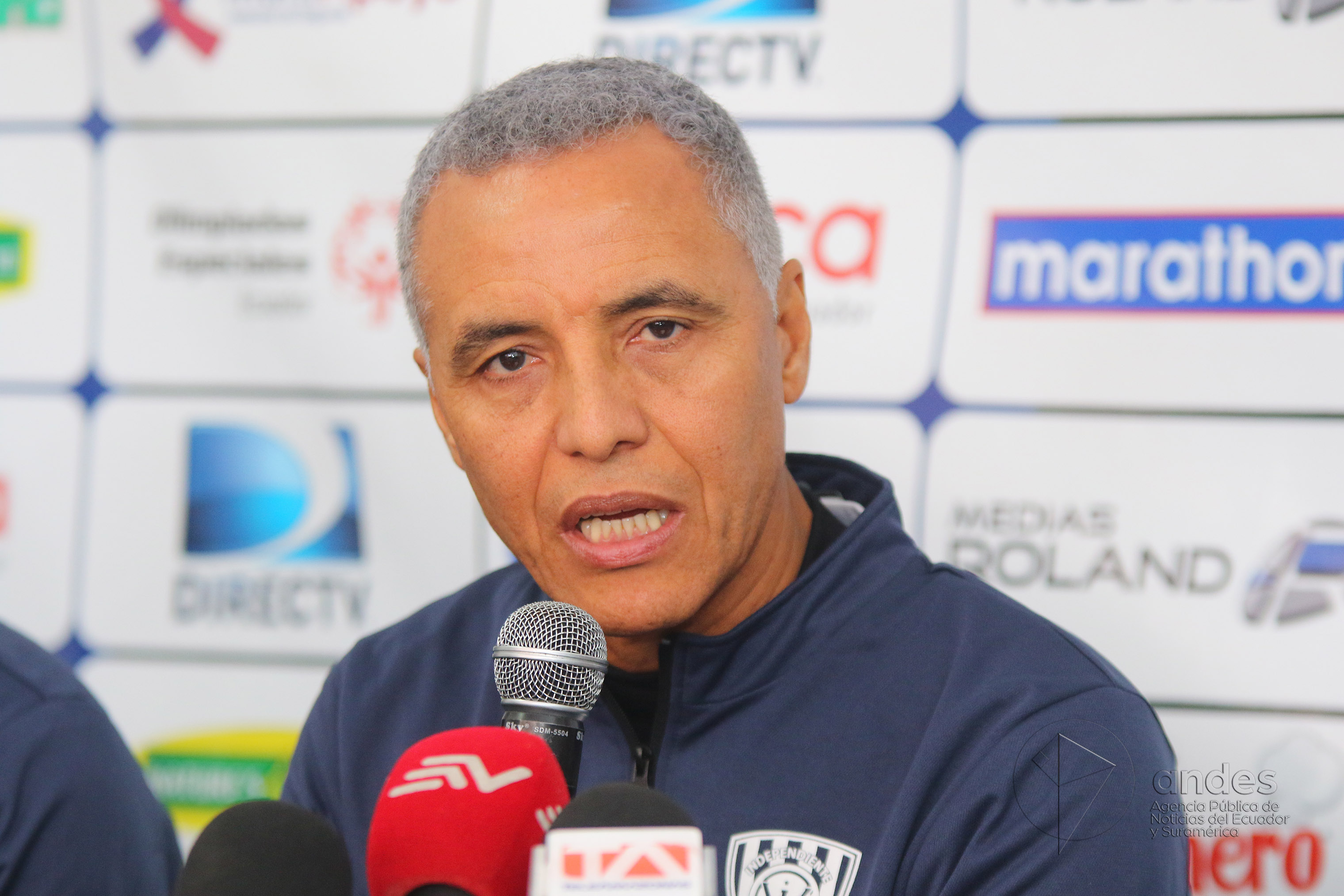 Quito, 02 Ago (Andes).- El plantel deportivo Independiente del Valle estrena nueva plantilla técnica con Alexis Mendoza como nuevo director técnico del equipo. Fotografías: Carlos Rodríguez/Andes.